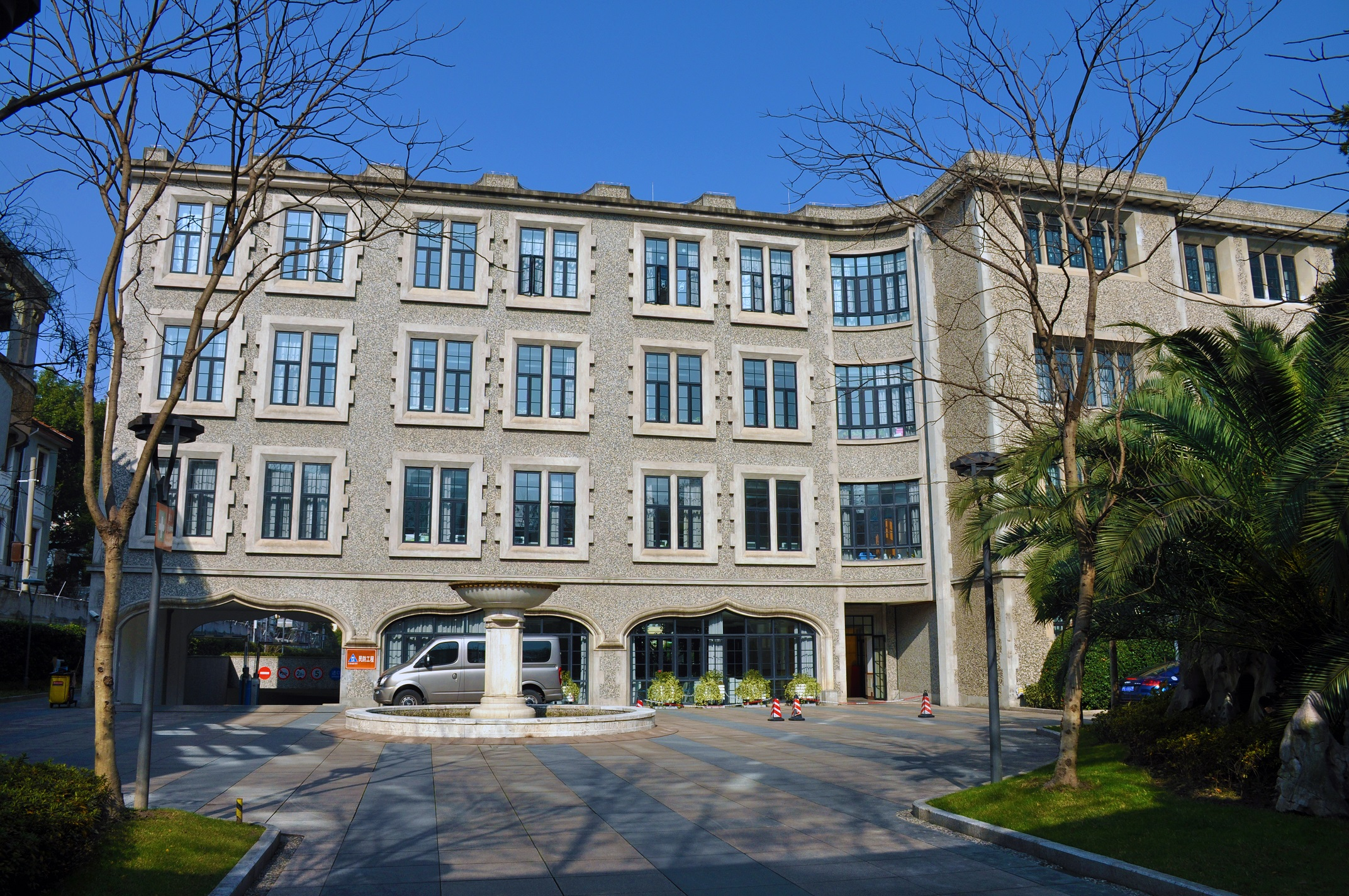 市西中学（2号楼） 愚园路404号